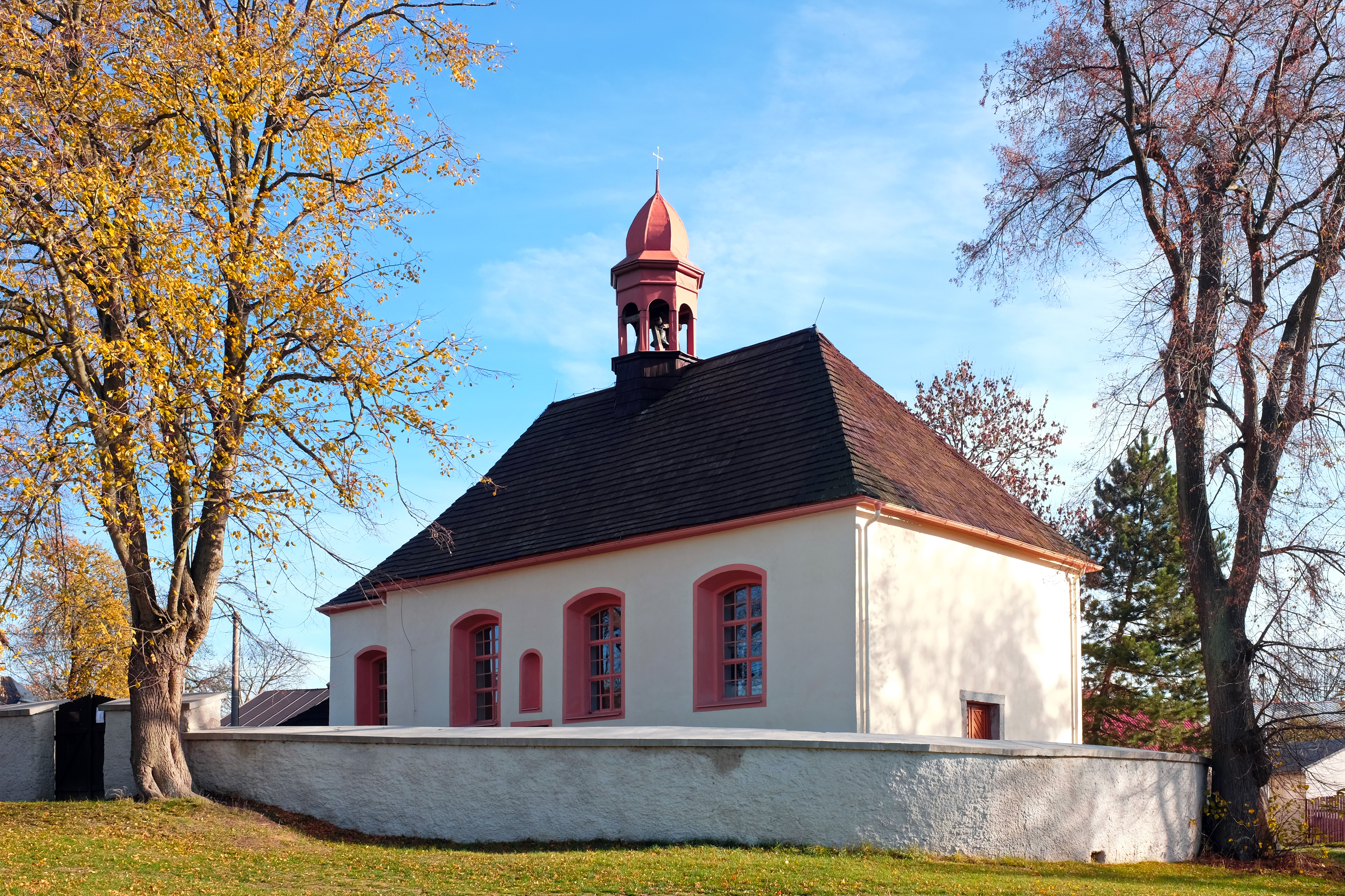 Kostel svaté Kateřiny, Olšová Vrata.